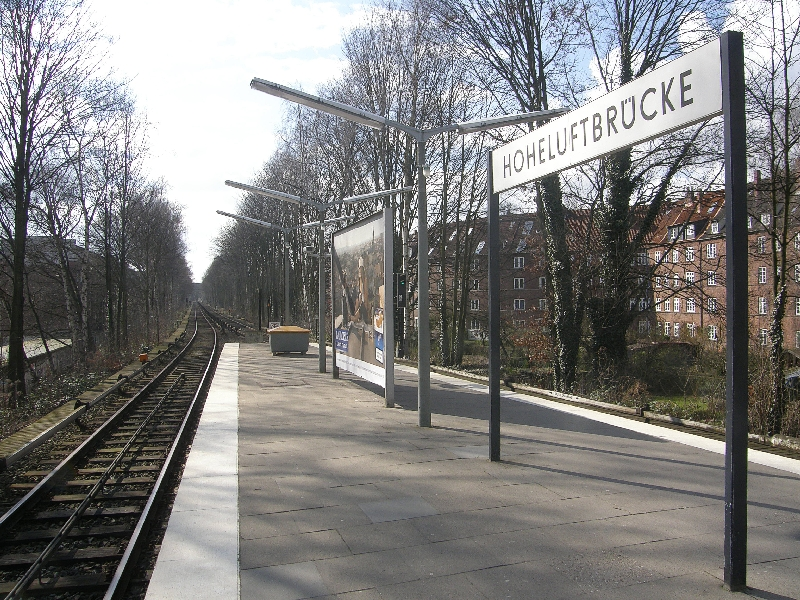 Bilder aus Hamburg